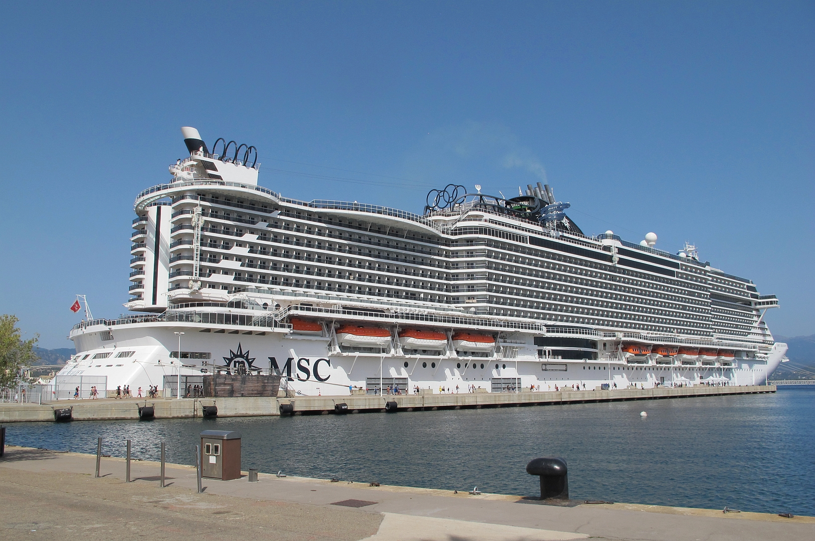 Le paquebot MSC Seaview à Ajaccio le 11 août 2019.